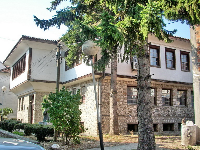 Град Струга (Република Македония) - родната къща на братя Миладинови. Сега дом на писателя.